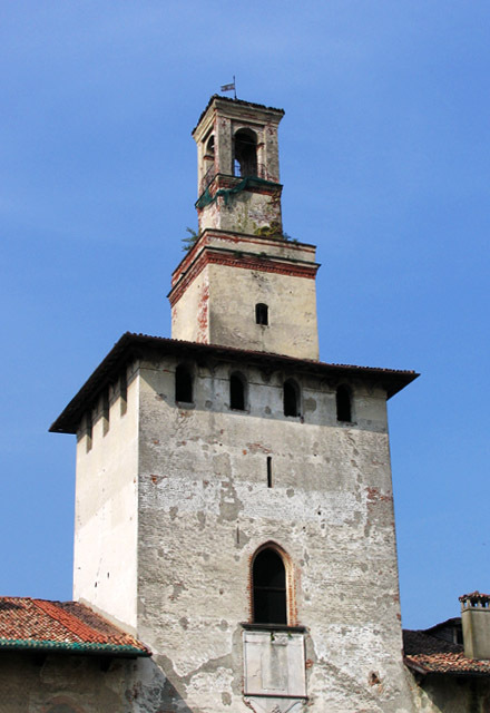 Castello a Cusago 09/2006